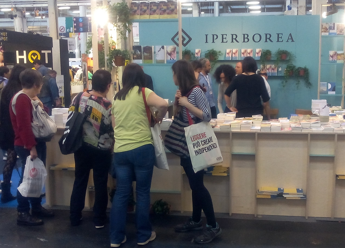 Stand edizioni Iperborea - salone del libro 2016